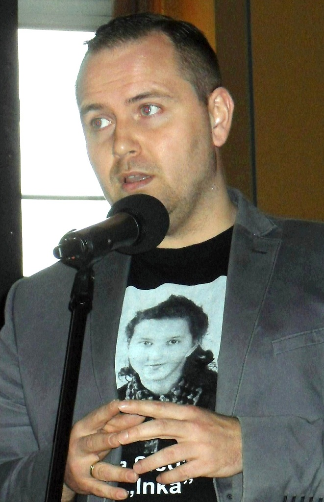 Dr Karol Nawrocki, historyk gdańskiego odziału IPN.